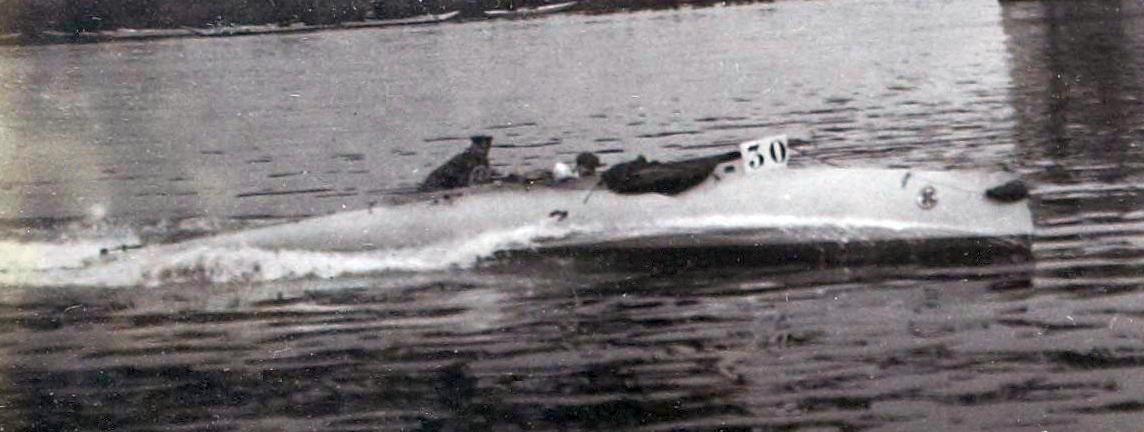 [Collection Jules Beau. Photographie sportive] : T. 28. Année 1904 / Jules Beau : F. 6. [Canots automobiles, Juvisy, 25 septembre 1904]